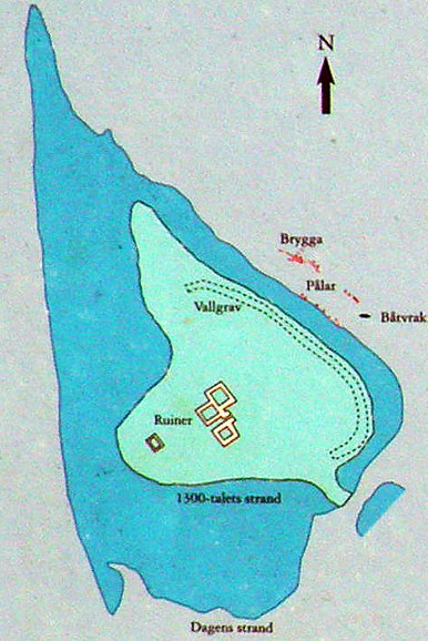 Telge hus karta på infoskylt